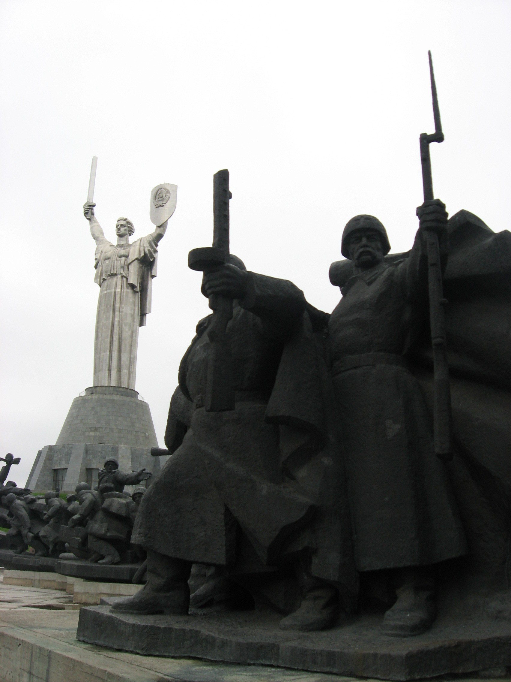 Меморіальний комплекс «Національний музей історії України у Другій світовій війні»